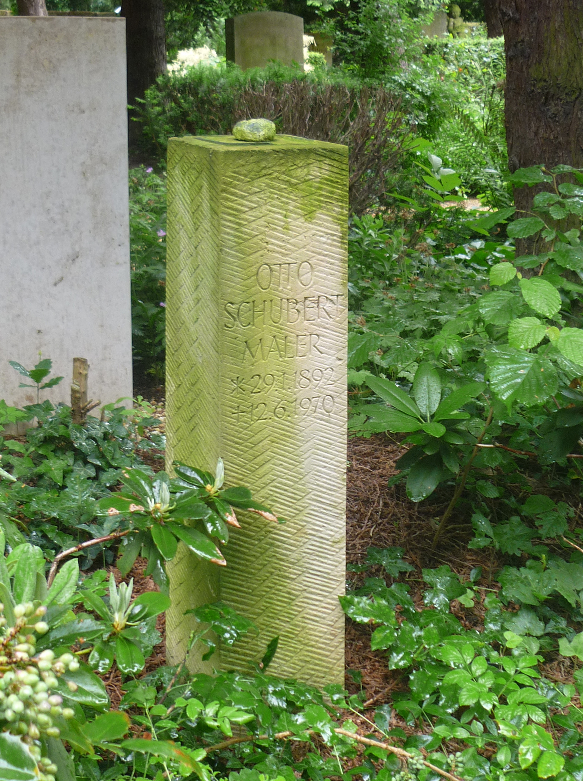 Loschwitzer Friedhof in Dresden-Loschwitz: Grabstätte Otto Schubert (1892–1970), Maler